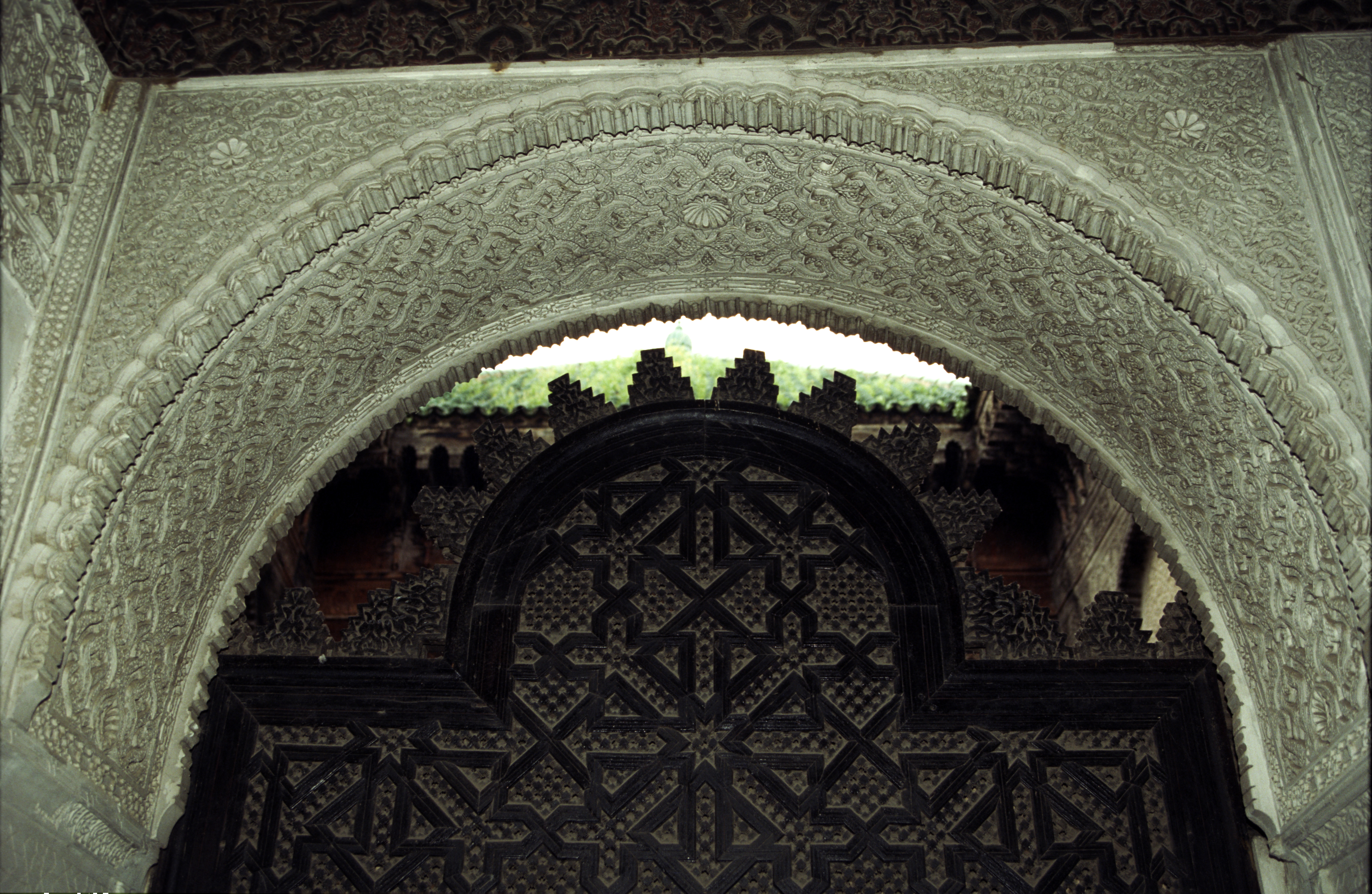 Fez. Medresa Al-Attarine. Nadproże drzwi wejściowych